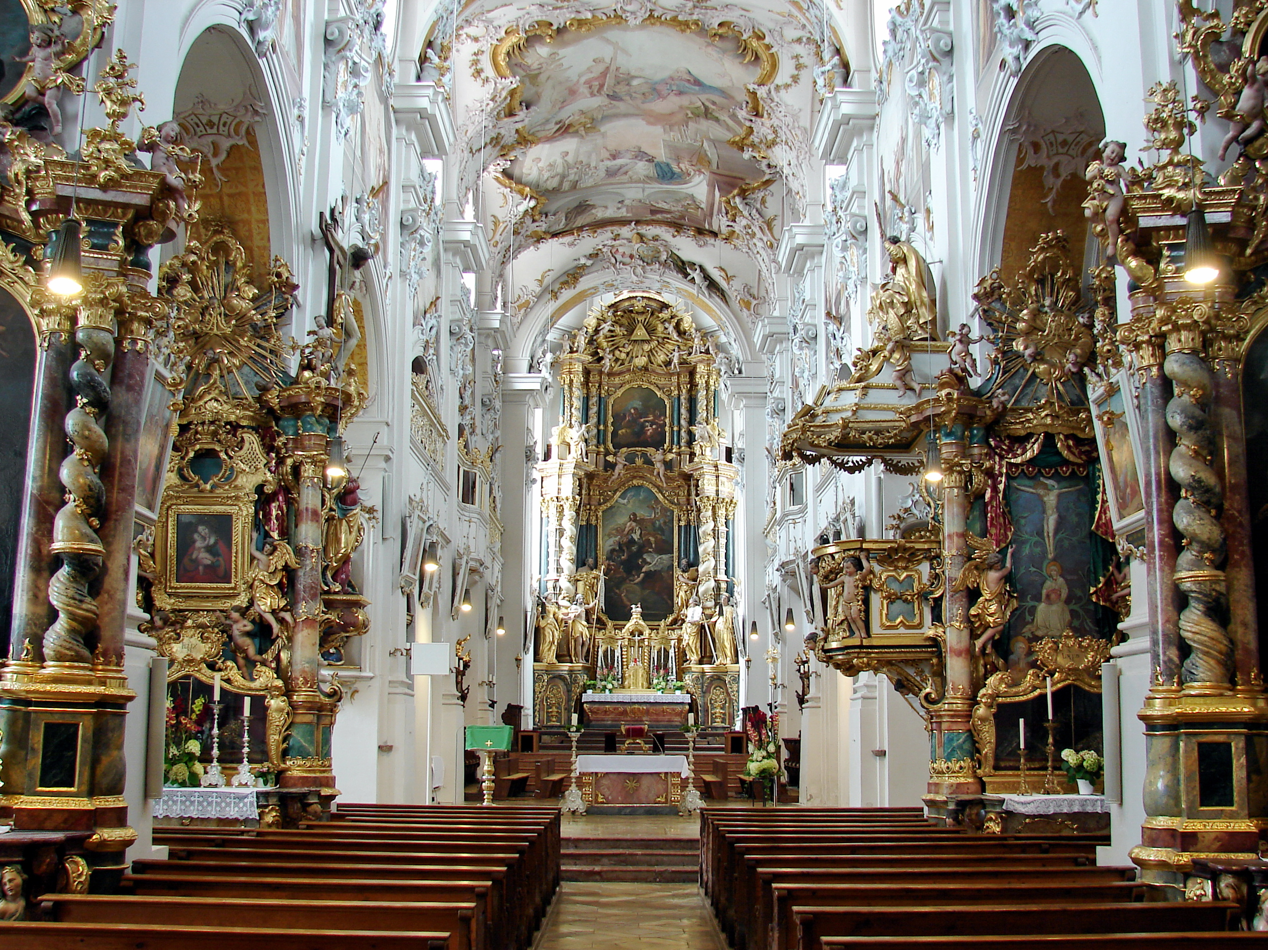 Das Kloster Indersdorf ist ein ehemaliges Kloster der Augustiner-Chorherren und späteres Kloster der Salesianerinnen in Markt Indersdorf in Bayern in der Erzdiözese München und Freising.